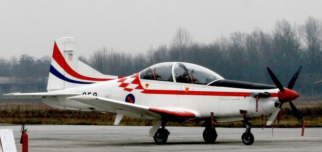 Pilatus PC-9, Zagreb